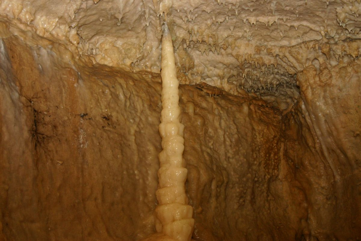 Binghöhle bei Streitberg